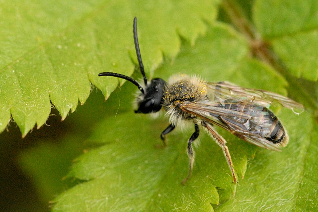 Andrena vaga from Commanster, Belgian High Ardennes .